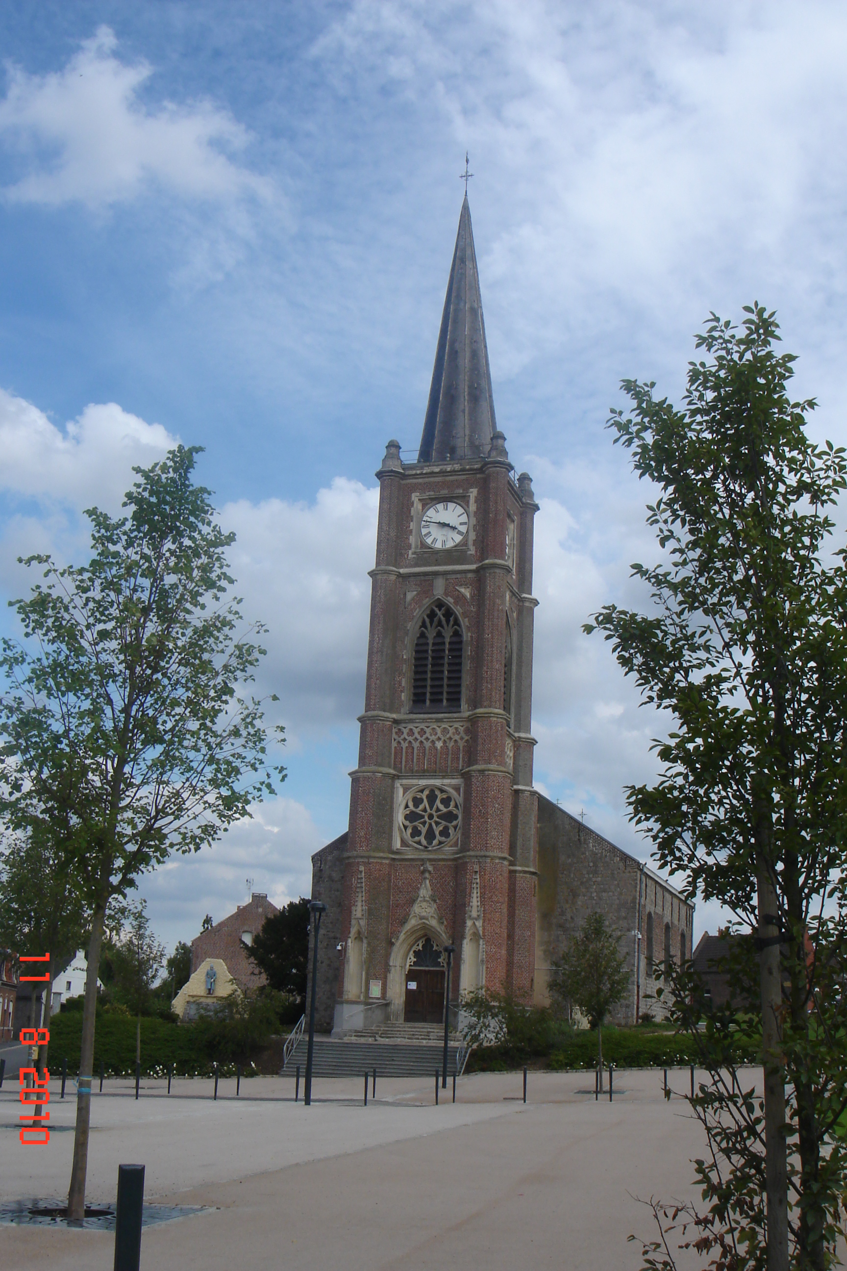 Église Saint-Nicolas de Monchecourt, Nord, Nord-Pas-de-Calais, France.